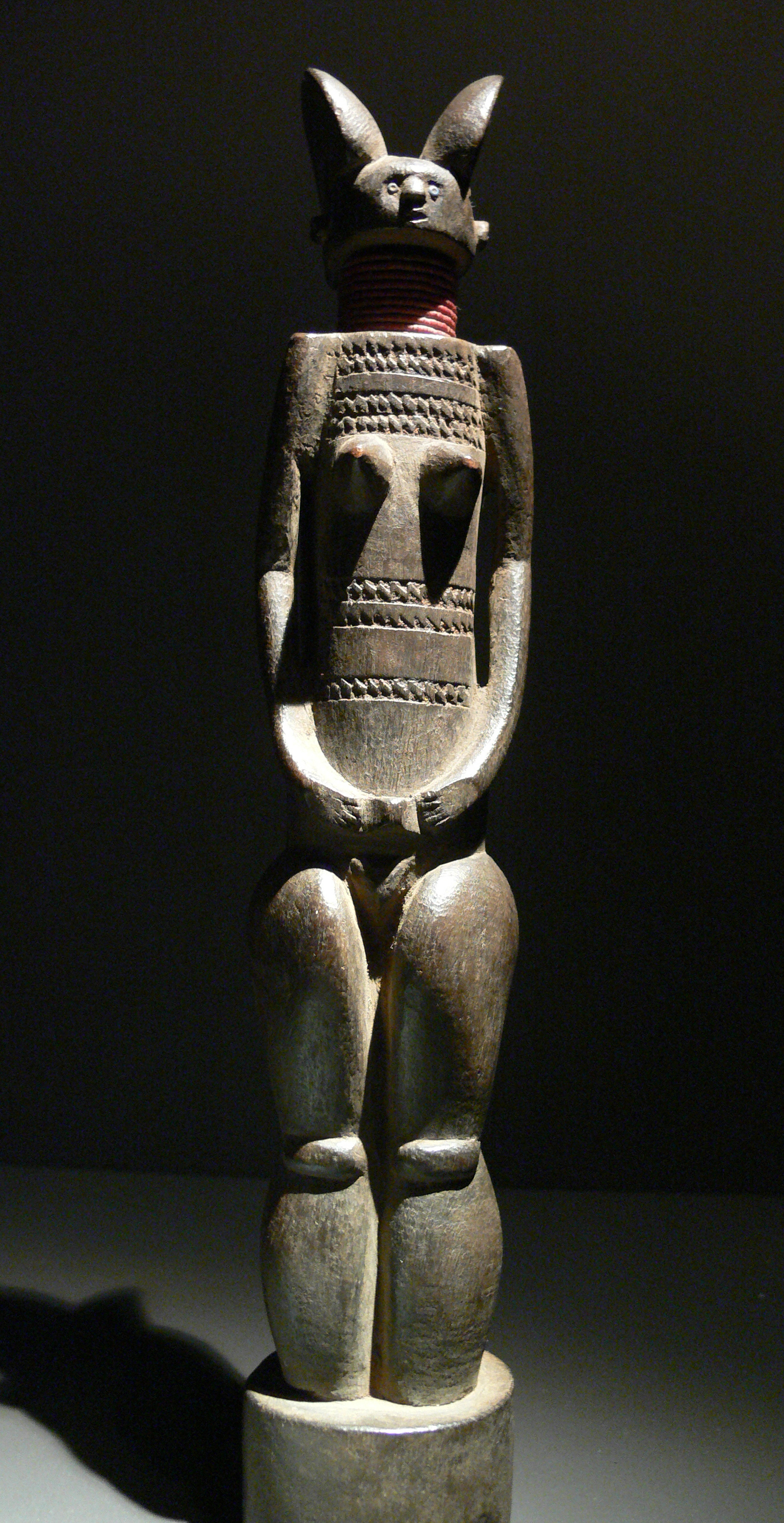 Weibliche Figur mwana hiti, Tansania, Doe; 20. Jahrhundert; Holz, Glas; Afrikaabteilung, Ethnologisches Museum Berlin, Inv. Nr. III E 20167, erworben im Kunsthandel 1995